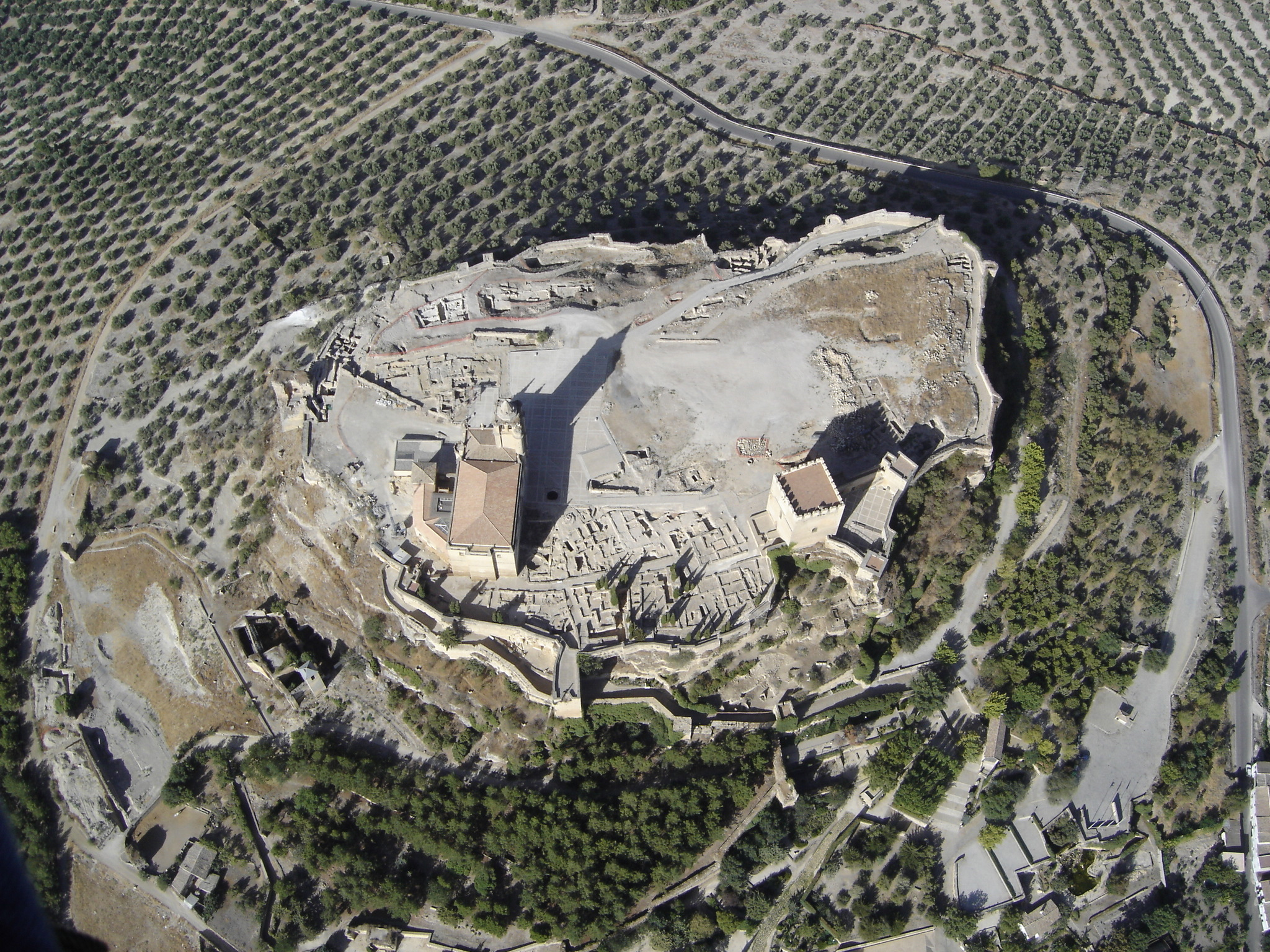 Vista aérea de la Fortaleza de la Mota, en Alcalá la Real (Jaén, España). Imagen aérea de La Mota tomada por mí en ala delta.